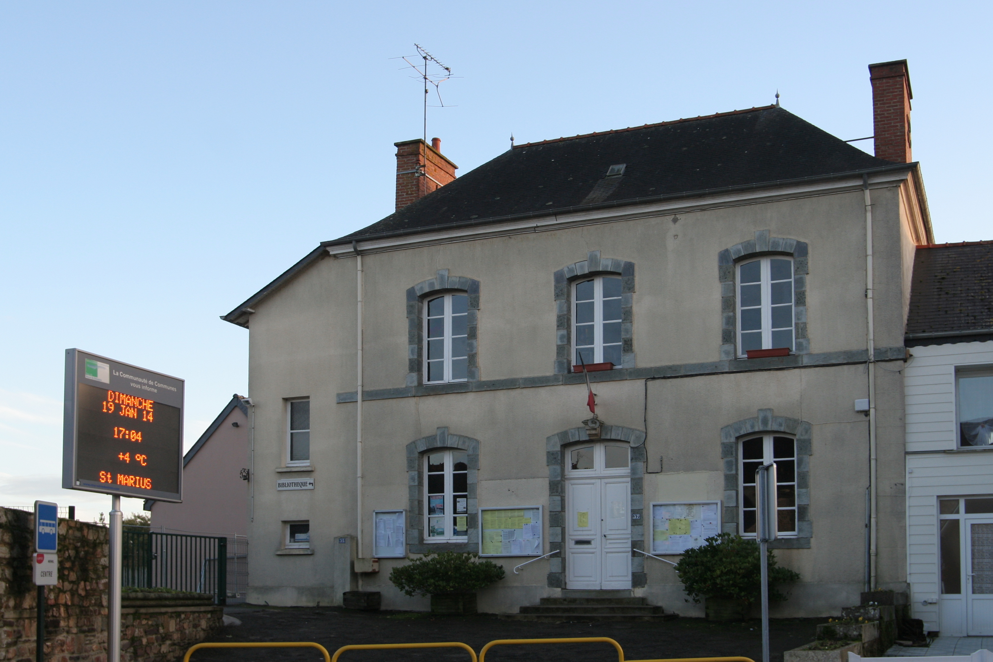 Mairie de Mernel.